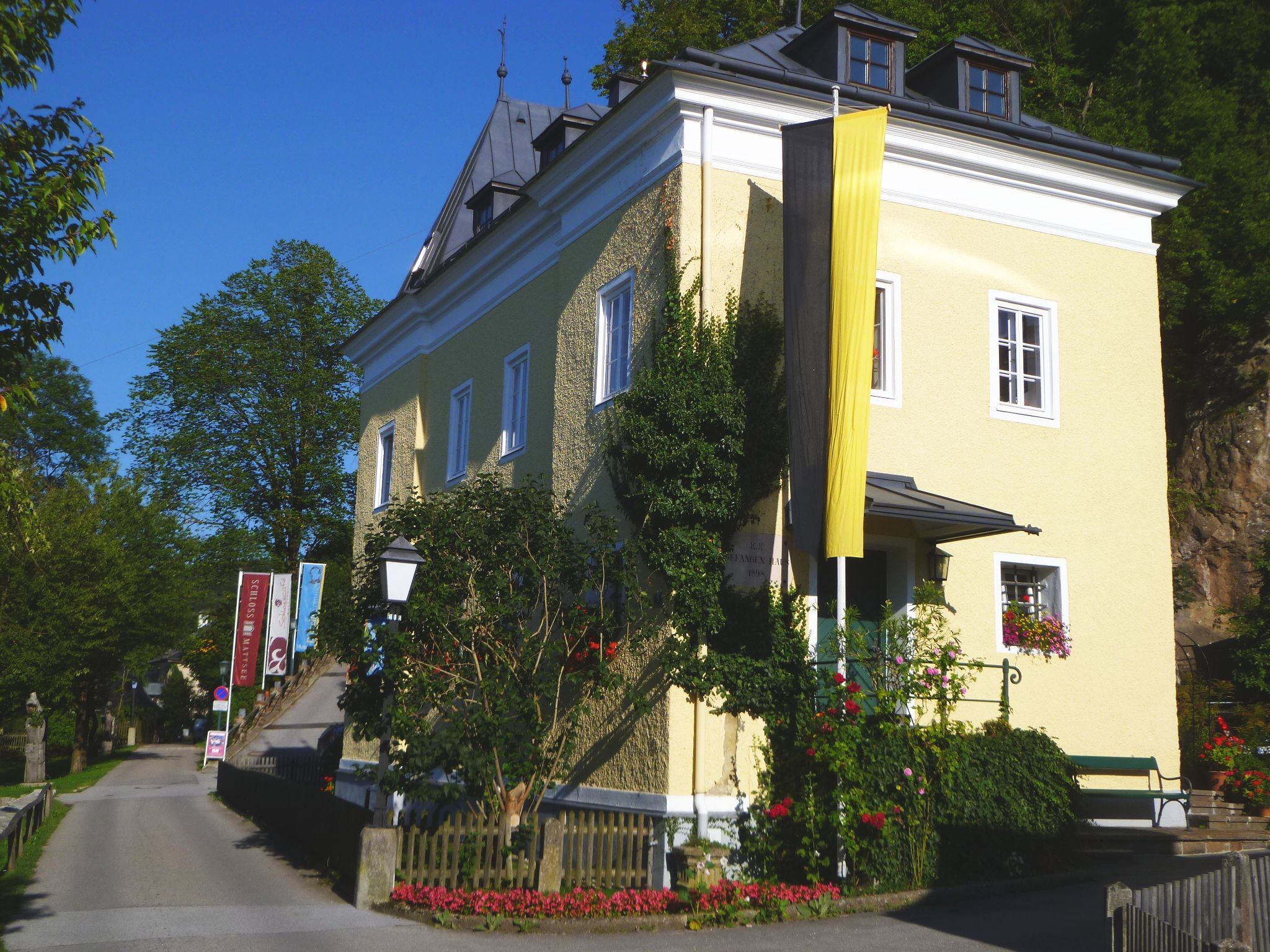 Pfleggericht Mattsee